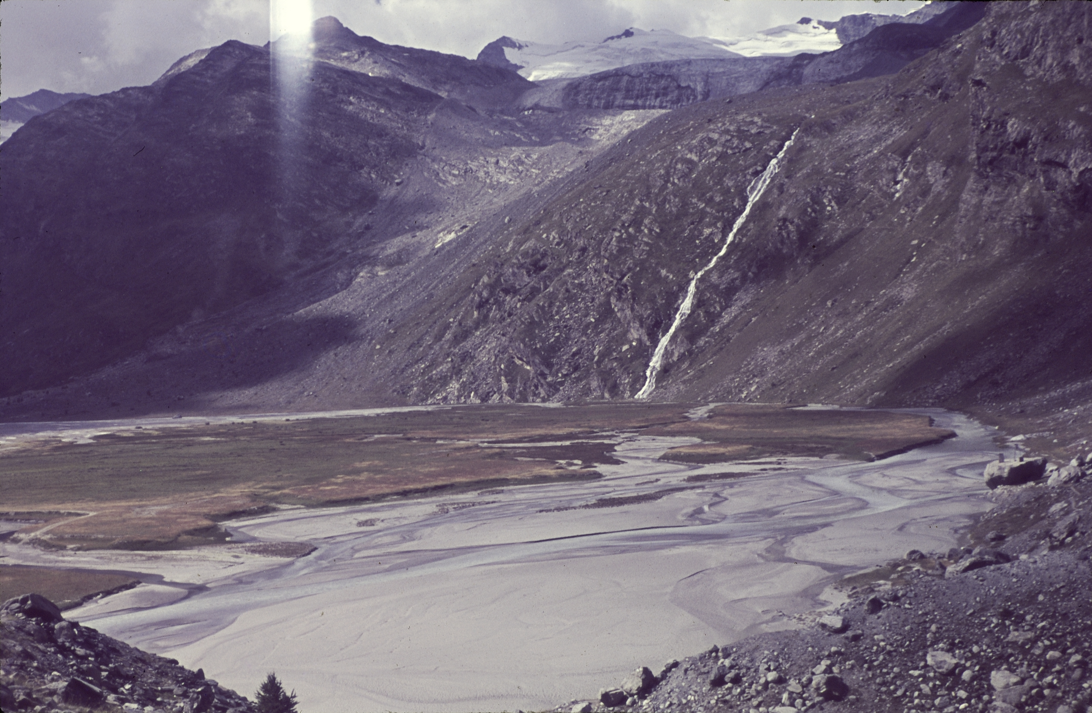 Mattmark, Blick nach Südsüdwesten (SSW) von der Moräne des Allalingletschers über die Mattmarkebene Richtung Grüenberghorn und Schwarzberggletscher